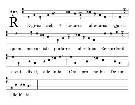 Regina coeli, laetare